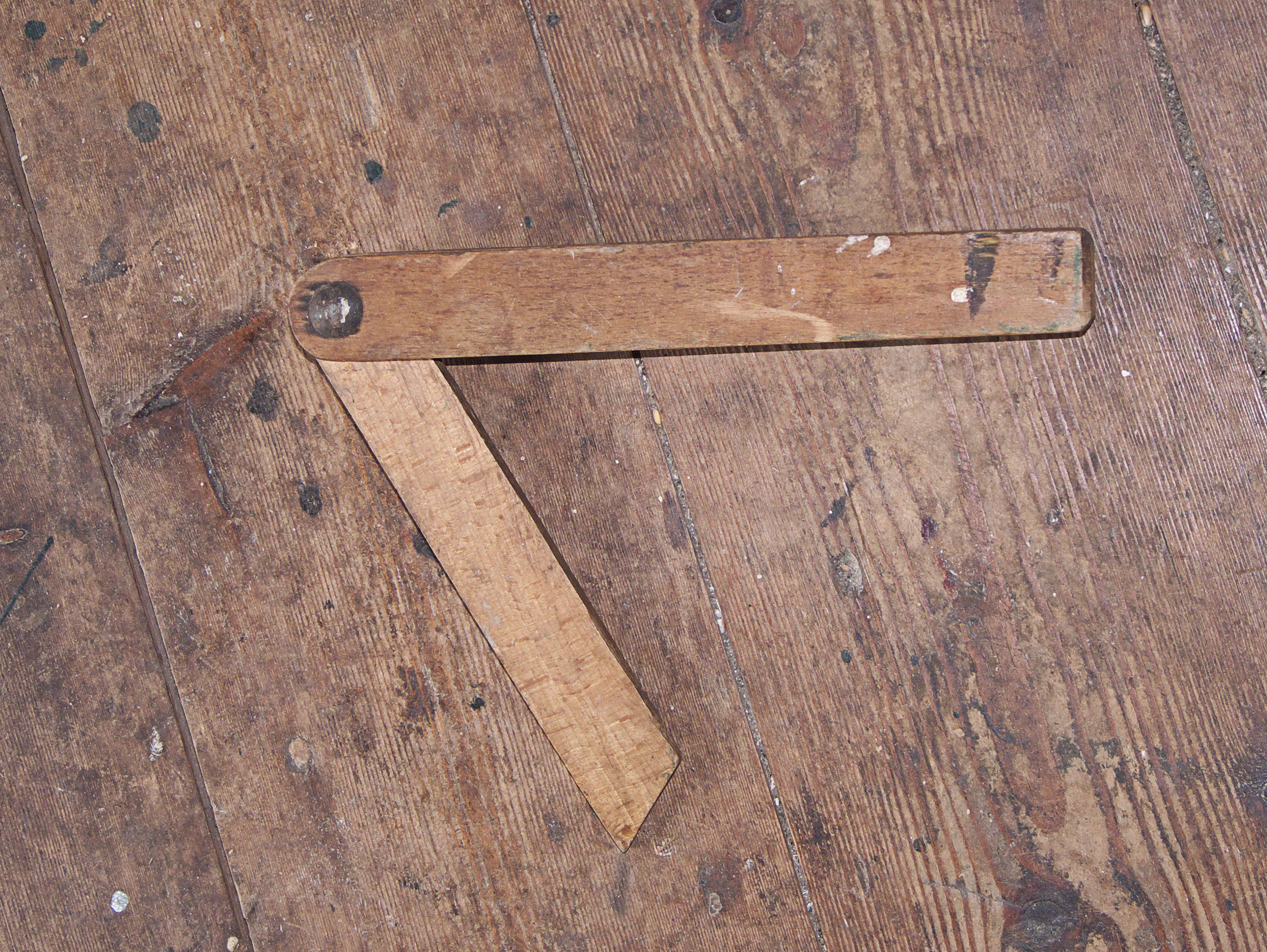 zwaaihaak